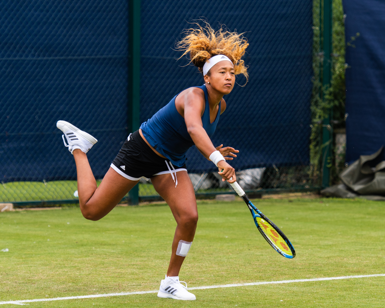 Naomi Osaka